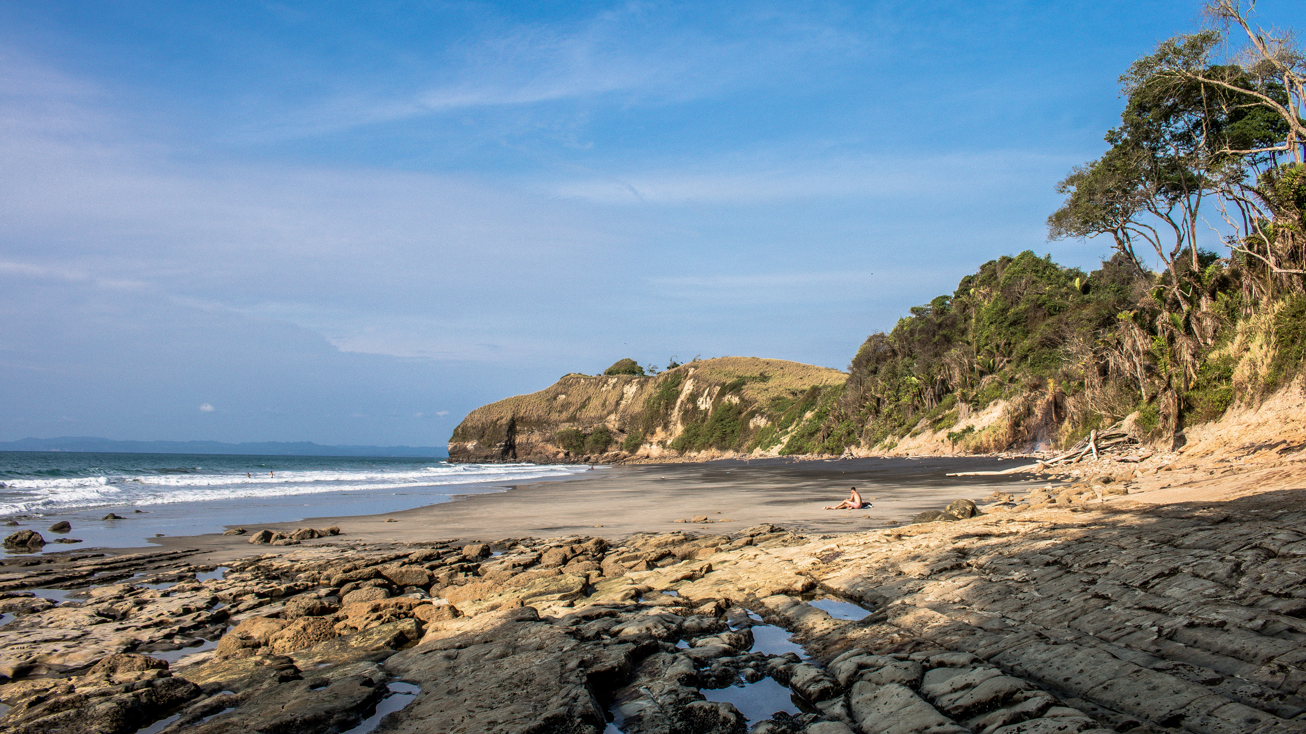 Playa Negra, Mompiche.